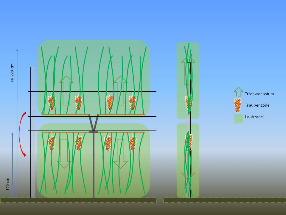 Scott Henry Erziehung